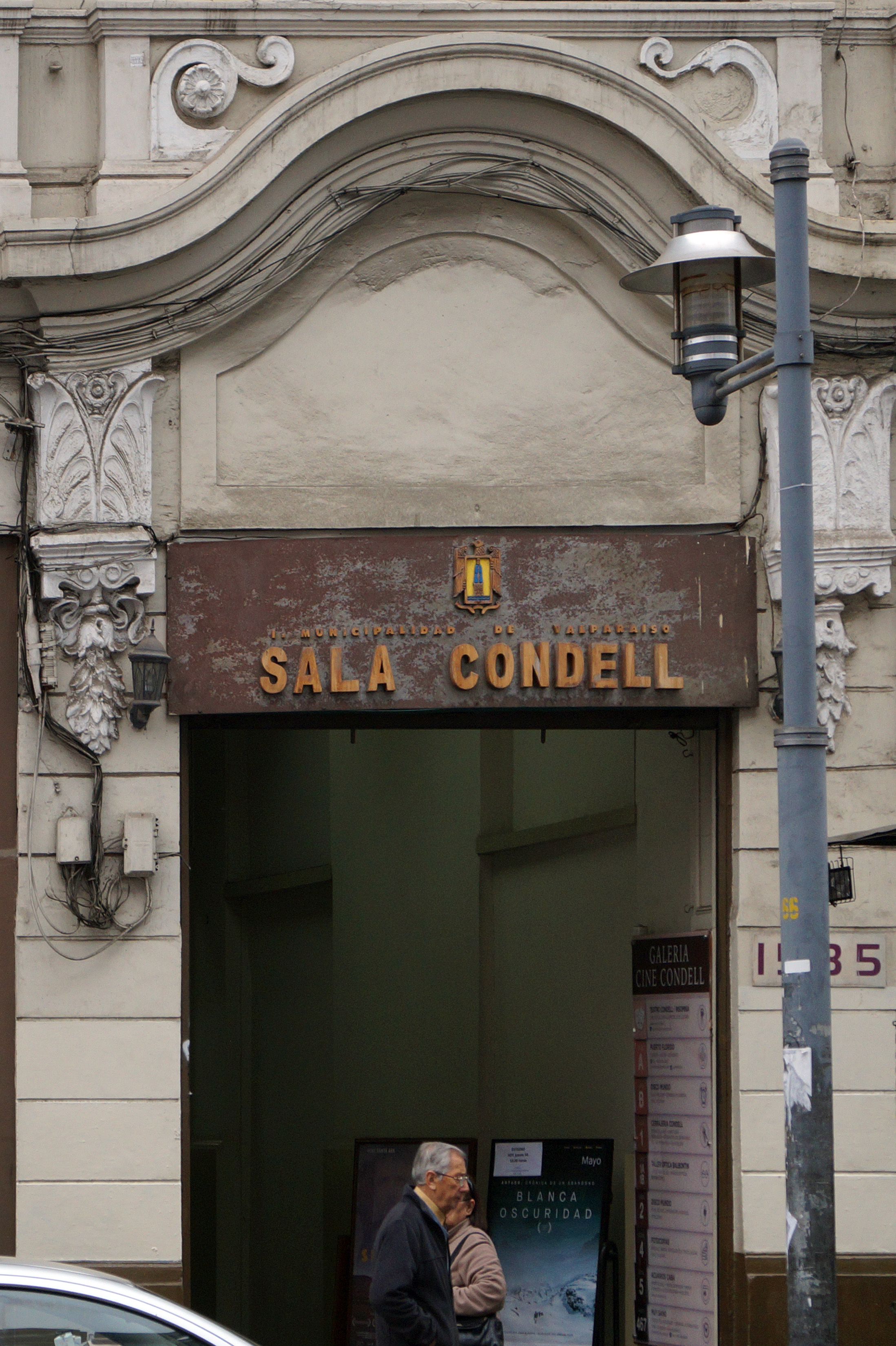 Teatro Condell de Valparaíso, Chile Ingreso por calle Condell